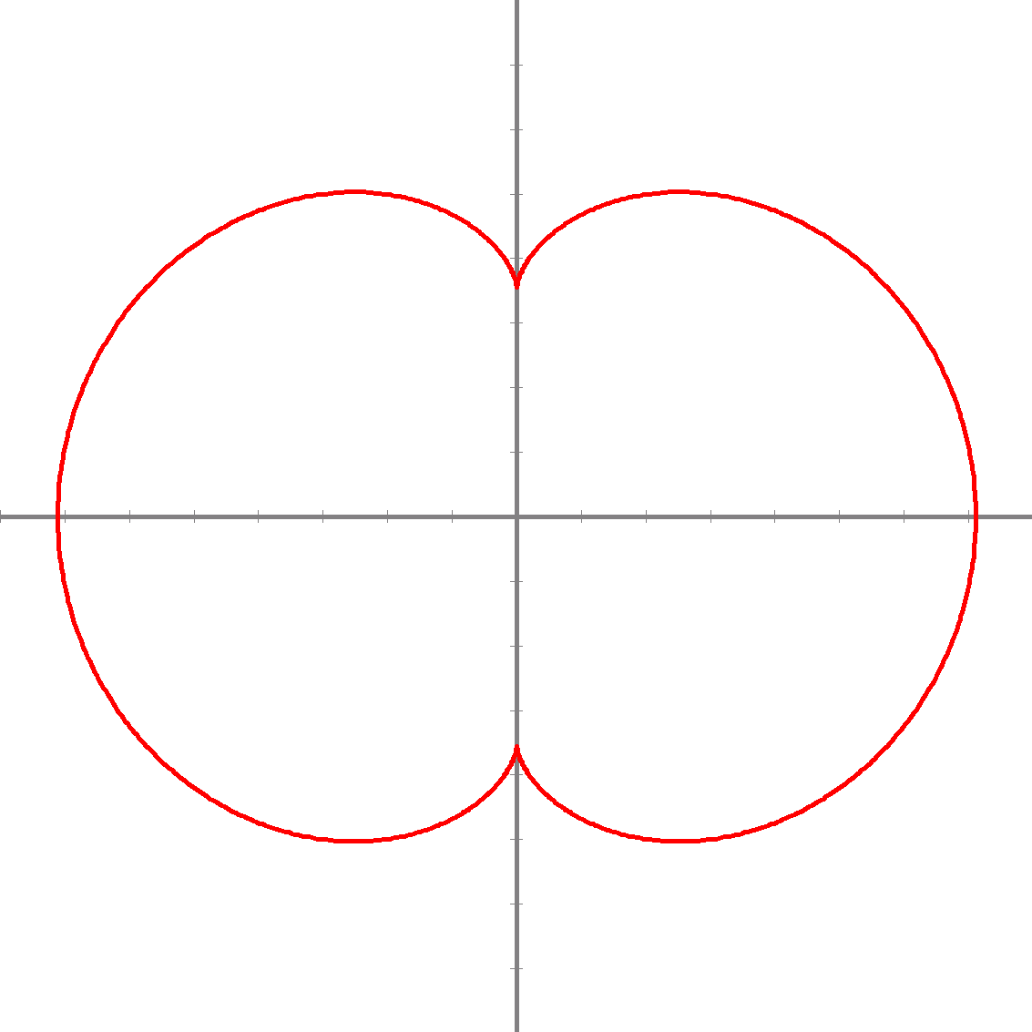 Epitrocoide a due lobi; questa curva piana costituisce il profilo interno dello statore del motore Wankel. 2-lobe epitrochoid ; the stator of Wankel engine has this as internal profile.